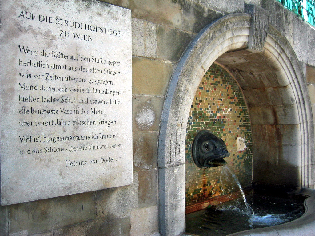 Strudlhofstiege, 9. Bezirk (Alsergrund), Wien (with a plate showing a poem by Heimito von Doderer)